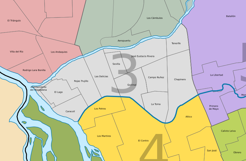 División barrial comuna 3, Neiva, departamento de Huila